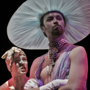 Z divadelního představení studentů DAMU "Hra"